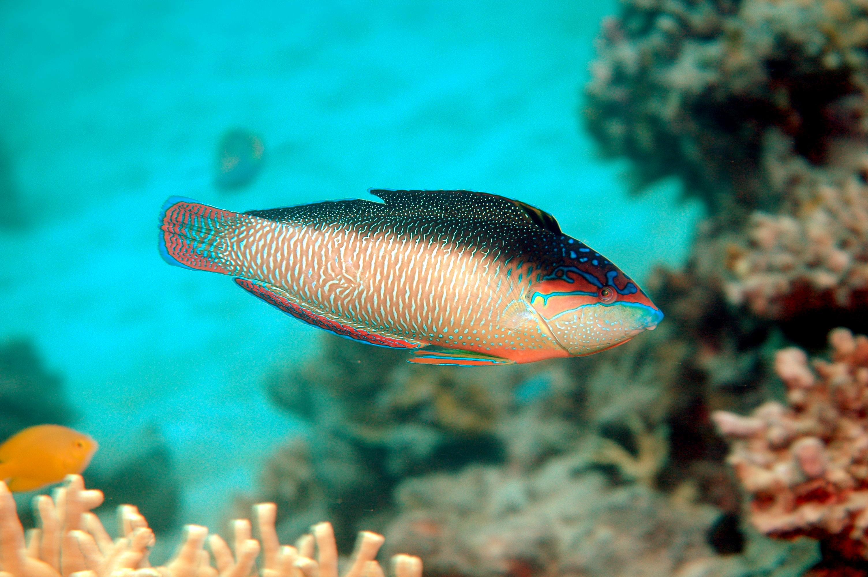 Schwarzrücken-Junker (Anampses neoguinaicus), Great Barrier Reef, Cairns, Australia